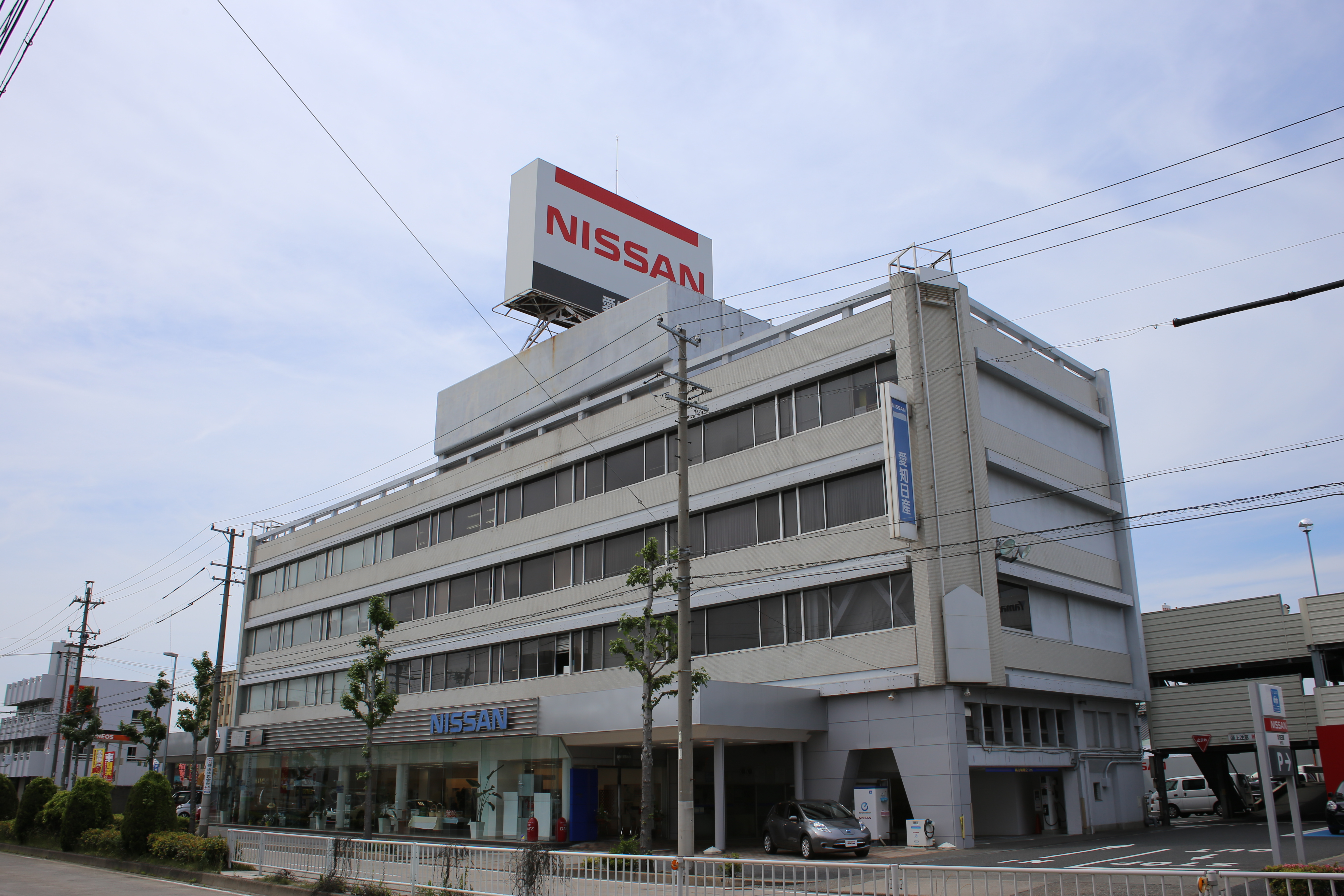 名古屋市熱田区桜田町の愛知日産自動車本社を南側公道東側より撮影